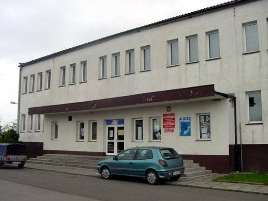 Gminny Ośrodek Kultury w Przeciszowie